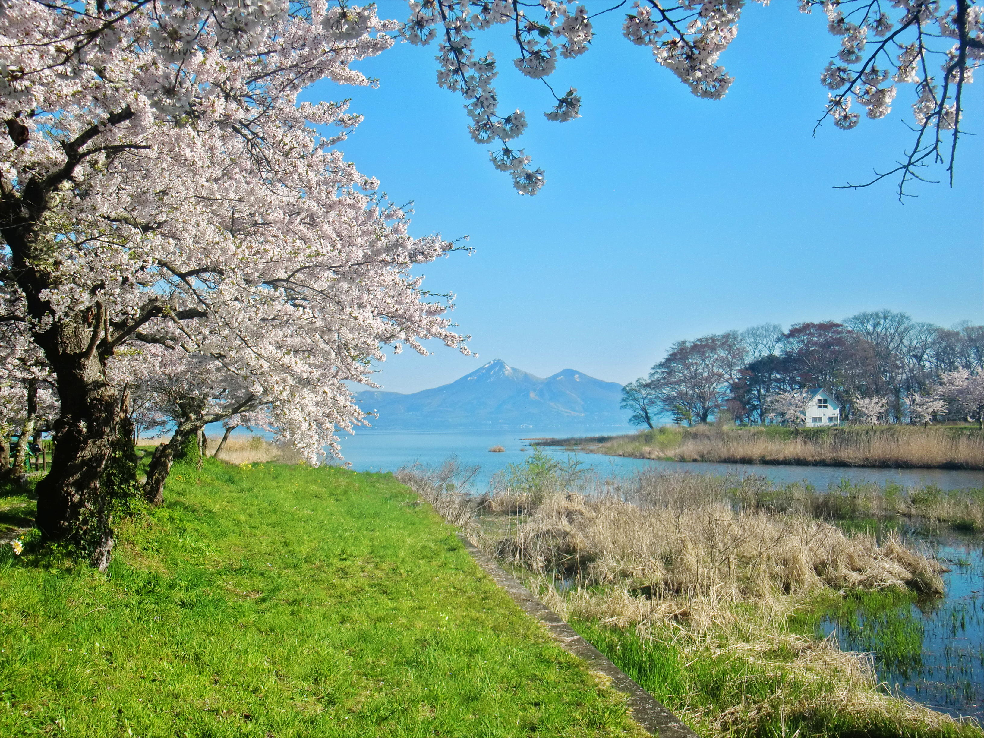 郡山市湖南町 舟津川の猪苗代湖河口付近の桜並木と磐梯山 舟津公園駐車場付近から